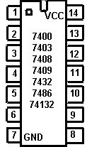 TTL 74XX Integrated Circuit diagram